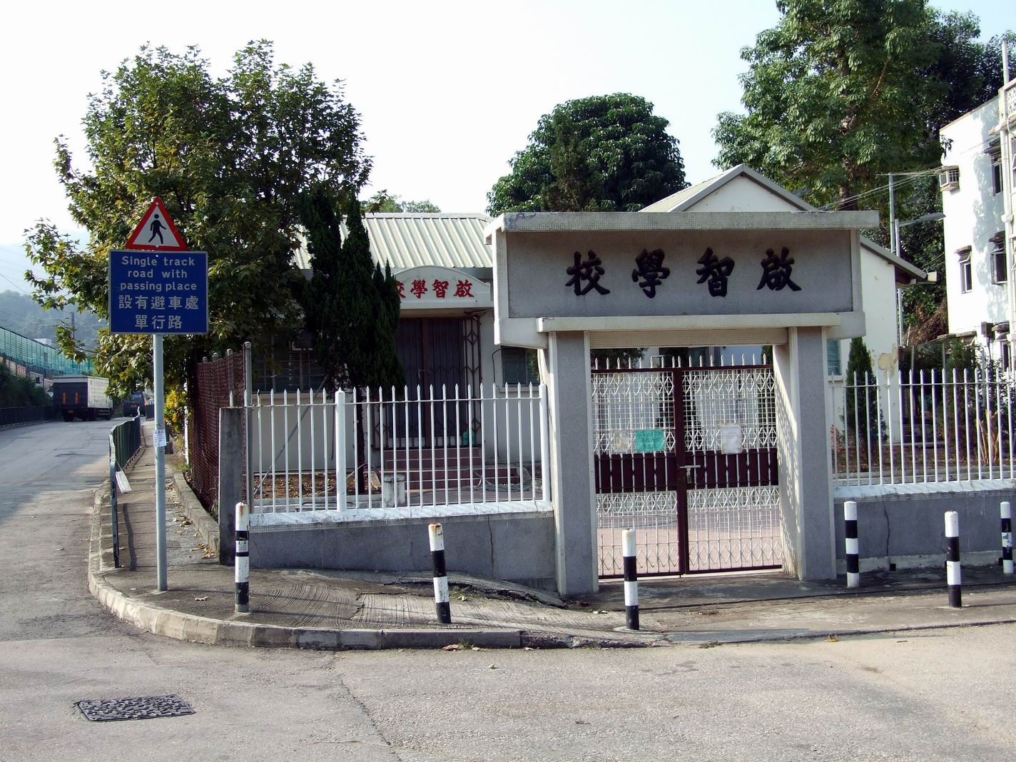 在村前方的啟智學校